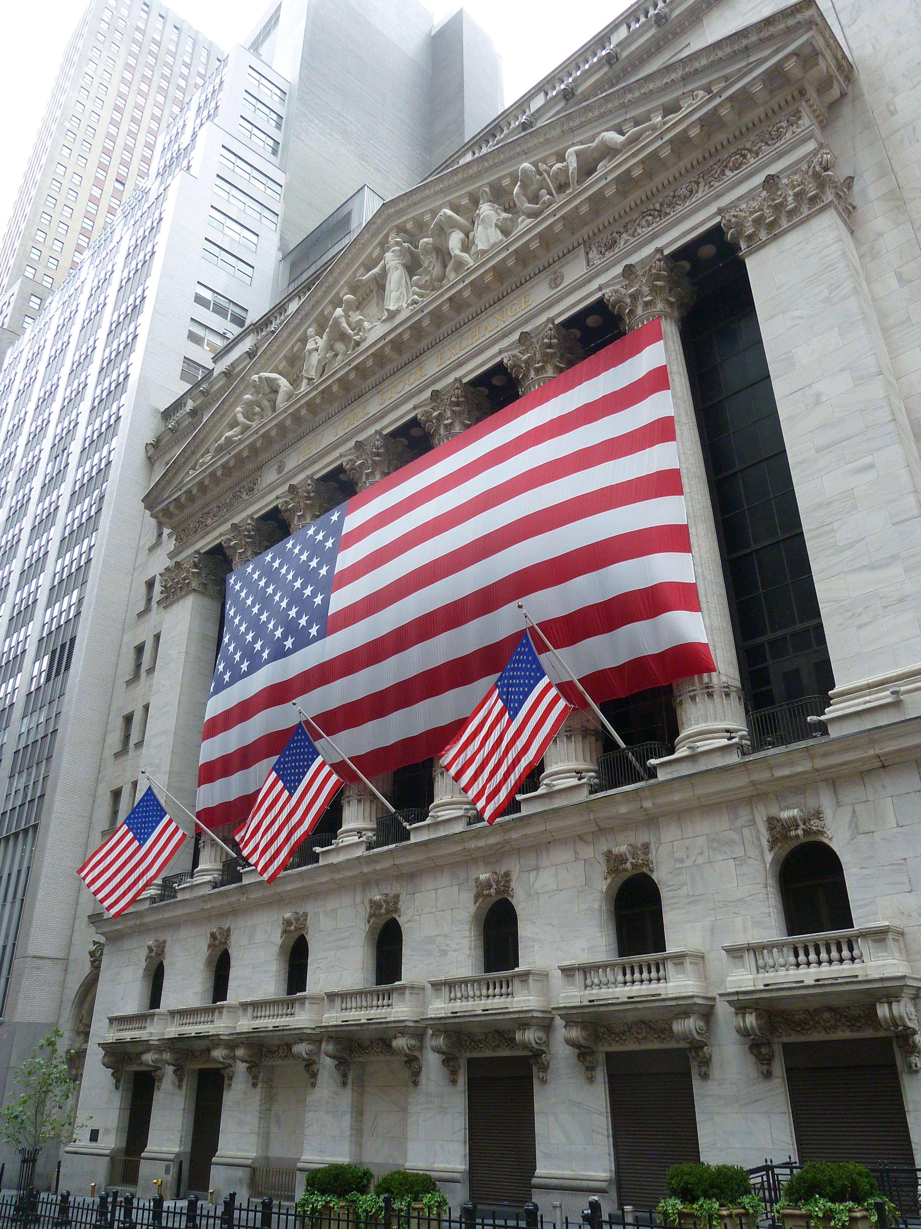 Bild der New Yorker Börse in der Wall St.